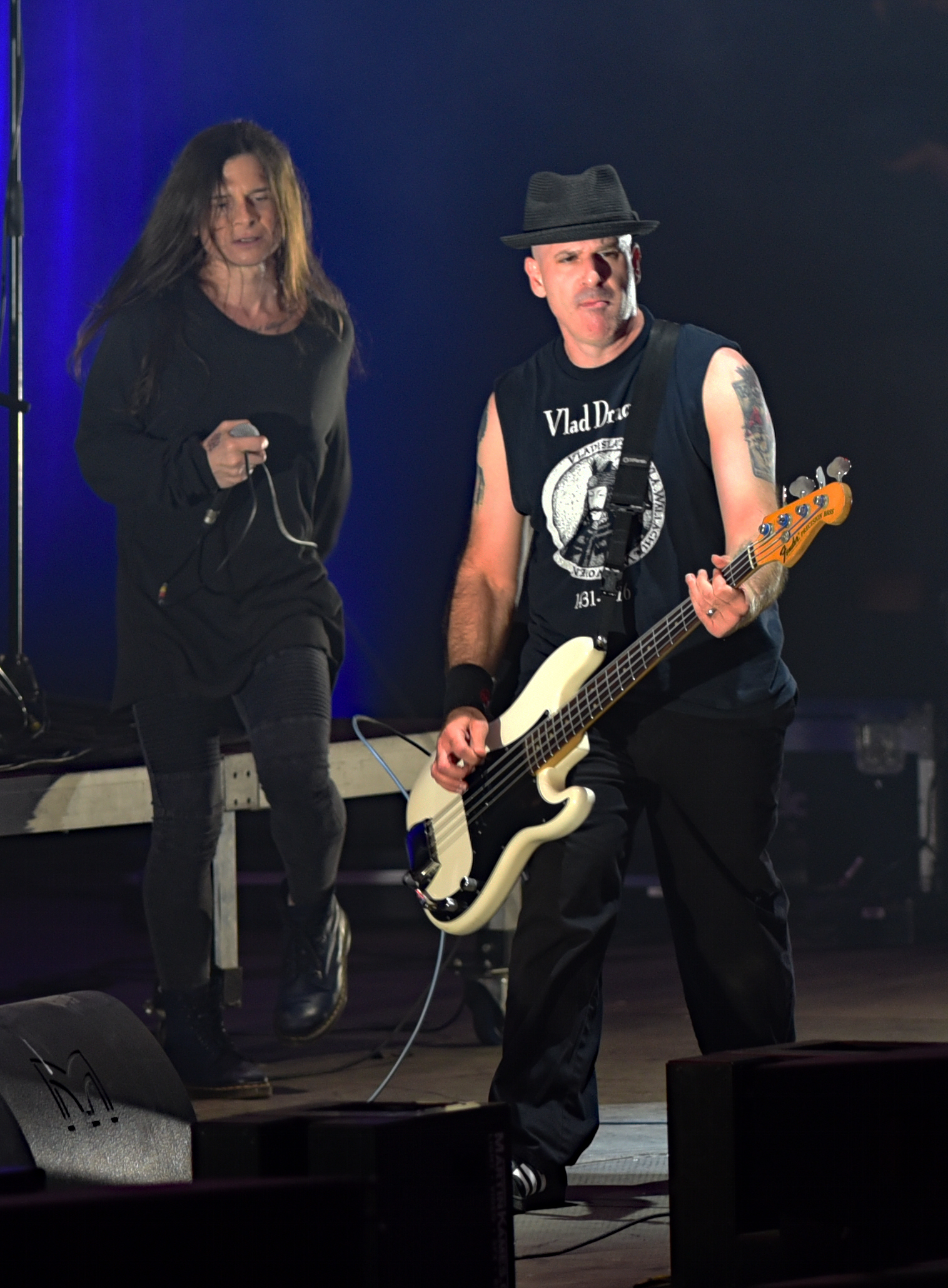 Life of Agony beim Reload Festival 2017